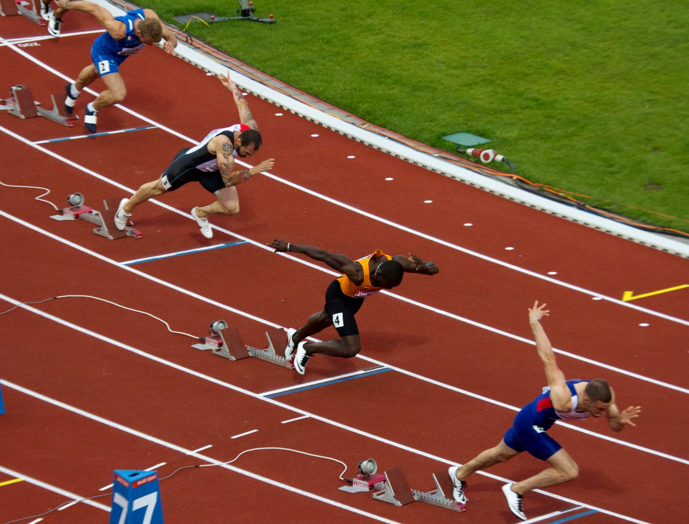 5281 finale 200m mannen